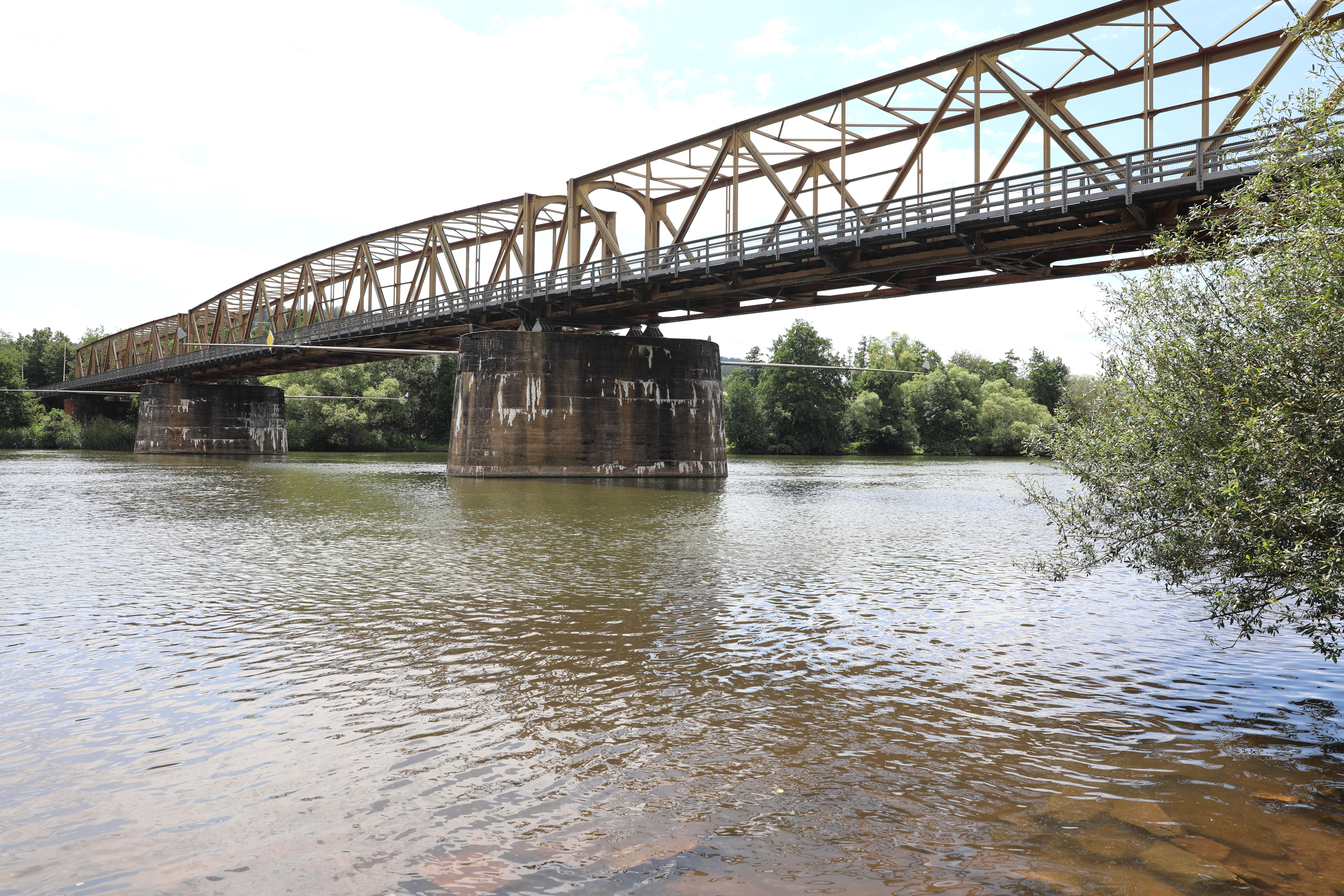 Mainbrücke bei Hasloch